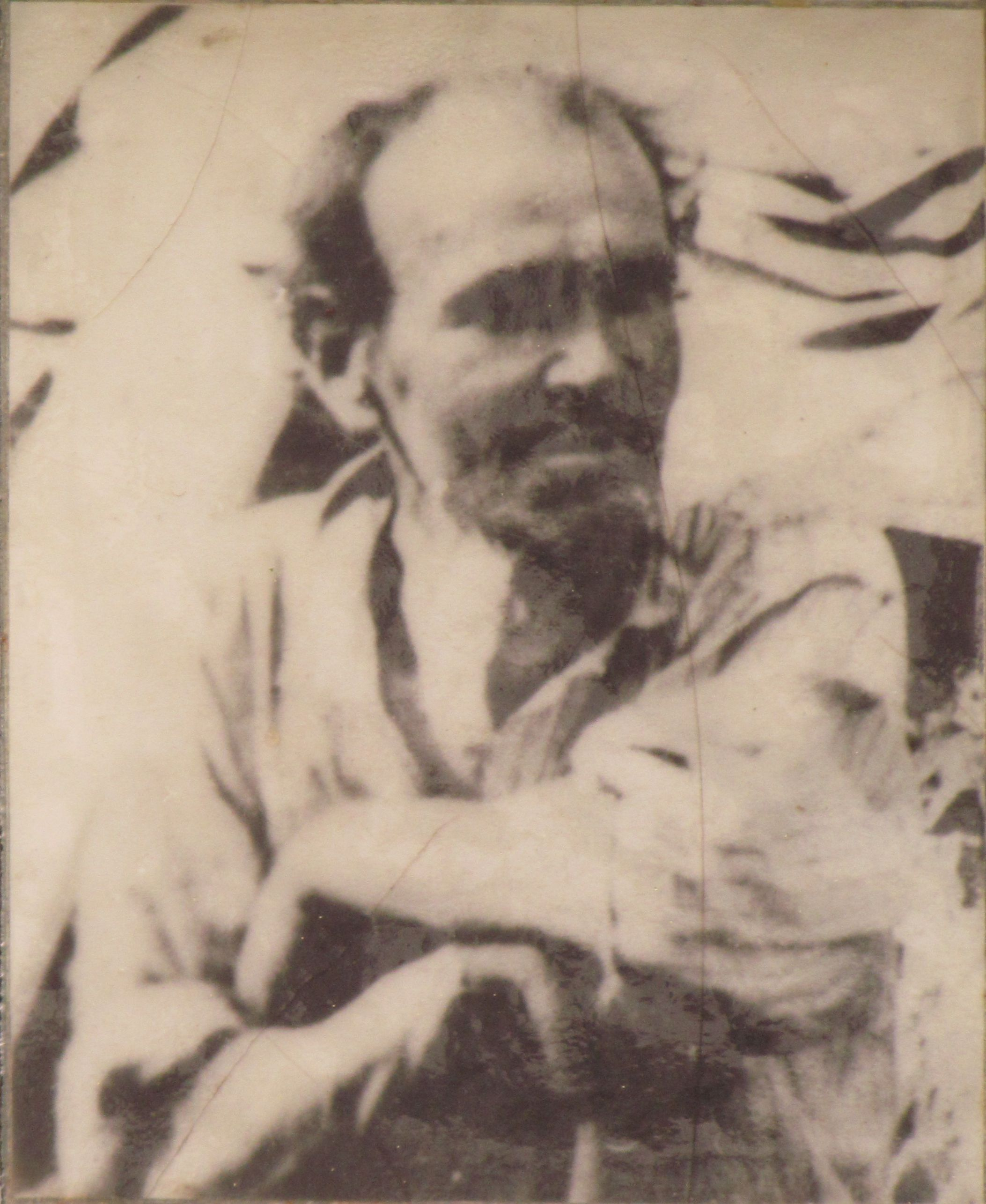 Václav Matoušek, český malíř